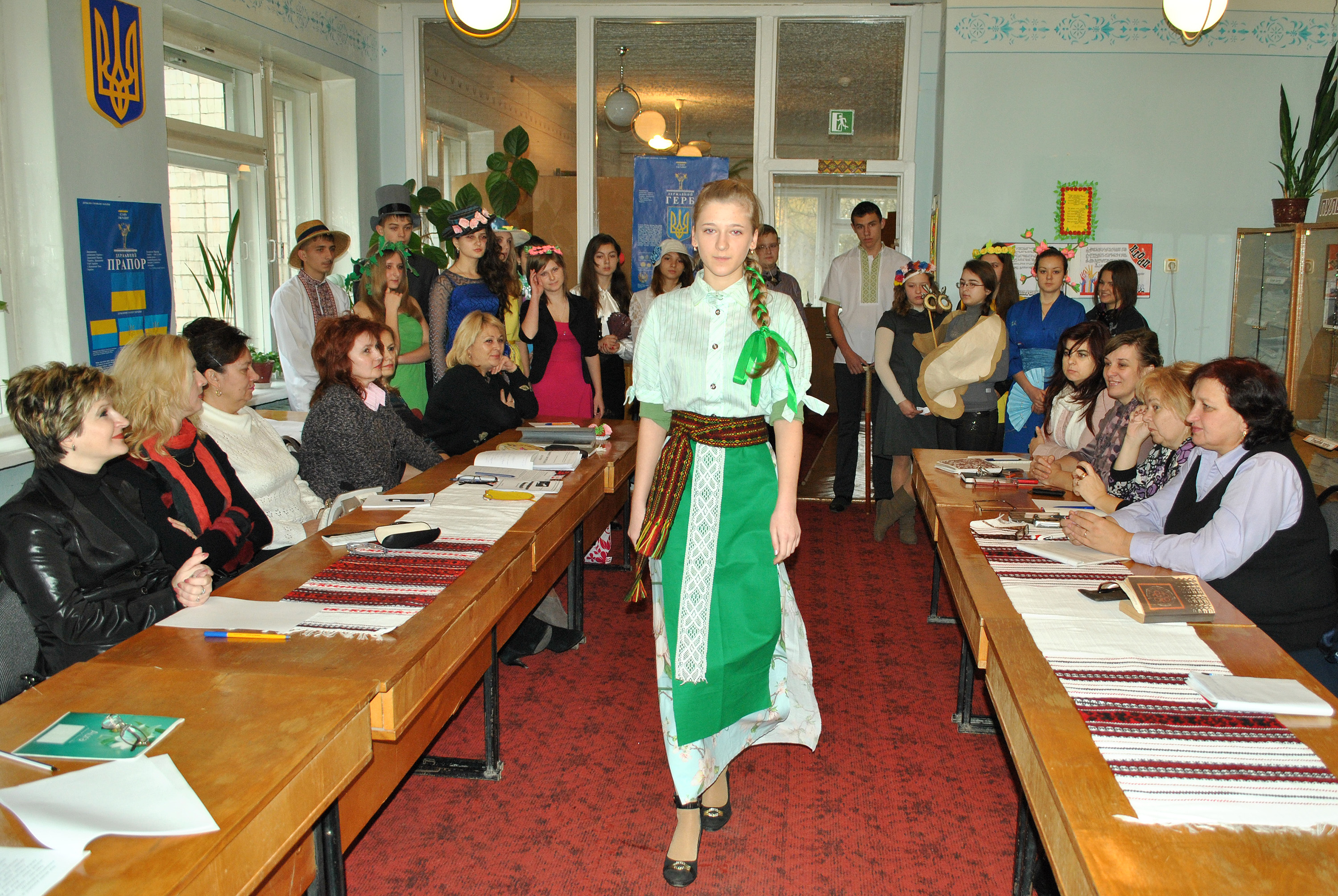 Бібліотека № 2 для дорослих у Тернополі. Літературні герої.